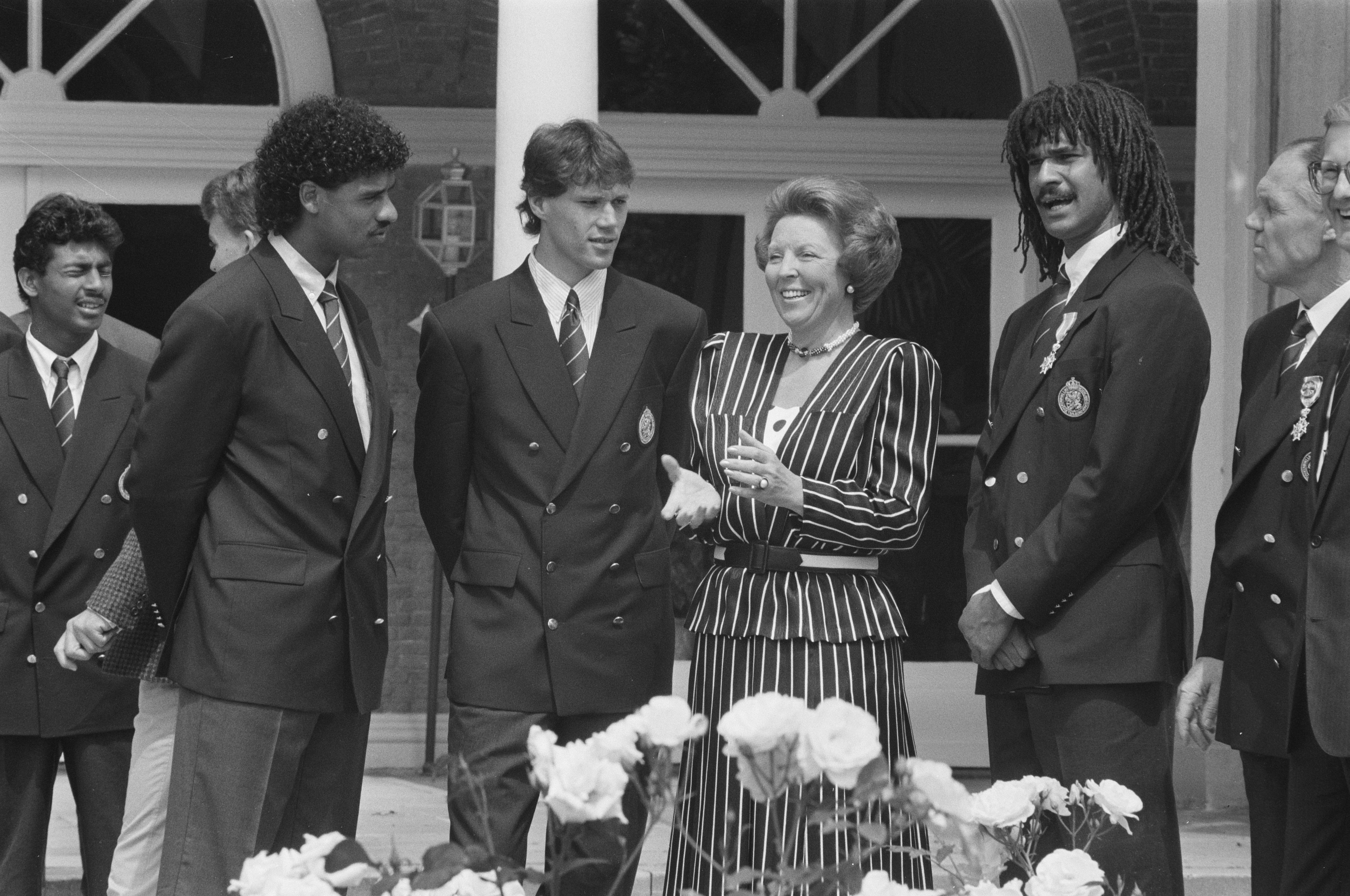 Collectie / Archief : Fotocollectie Anefo Reportage / Serie : [ onbekend ] Beschrijving : Ontvangst Nederlands elftal op Paleis Huis ten Bosch na 1988; v.l.n.r. Rijkaard, Van Basten , HM, Gullit en Michels Datum : 27 juni 1988 Locatie : Den Haag, Zuid-Holland Trefwoorden : sport, voetbal Persoonsnaam : Basten, Marco van, Gullit, Rijkaard, Frank Instellingsnaam : Paleis Huis ten Bosch Fotograaf : Croes, Rob C. / Anefo Auteursrechthebbende : Nationaal Archief Materiaalsoort : Negatief (zwart/wit) Nummer archiefinventaris : bekijk toegang 2.24.01.05 Bestanddeelnummer : 934-2756